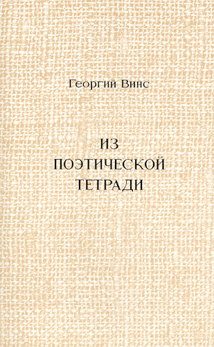 Обложка книги стихов Георгия Винса "Из поэтической тетради"